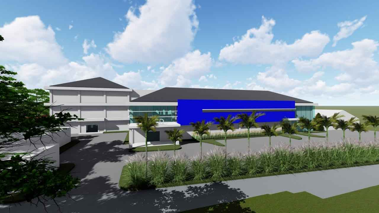 Foto rencana bangunan utama RSU Dadi Keluarga Ciamis